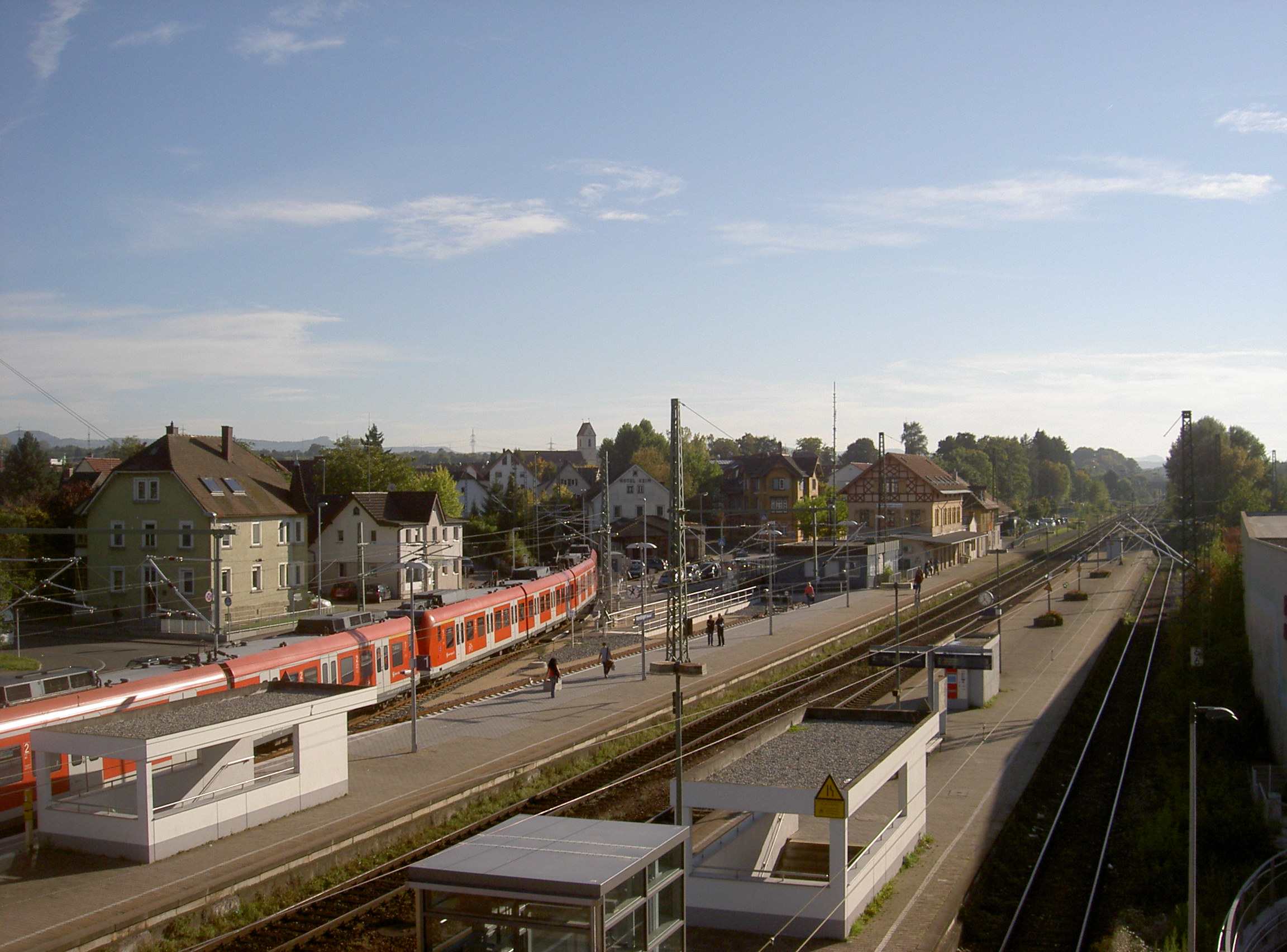 Bahnhof Wendlingen